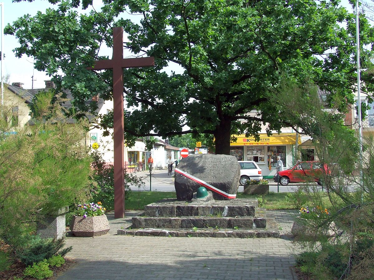 Brwinów, pomnik upamiętniający bitwę pod Brwinowem w 1939